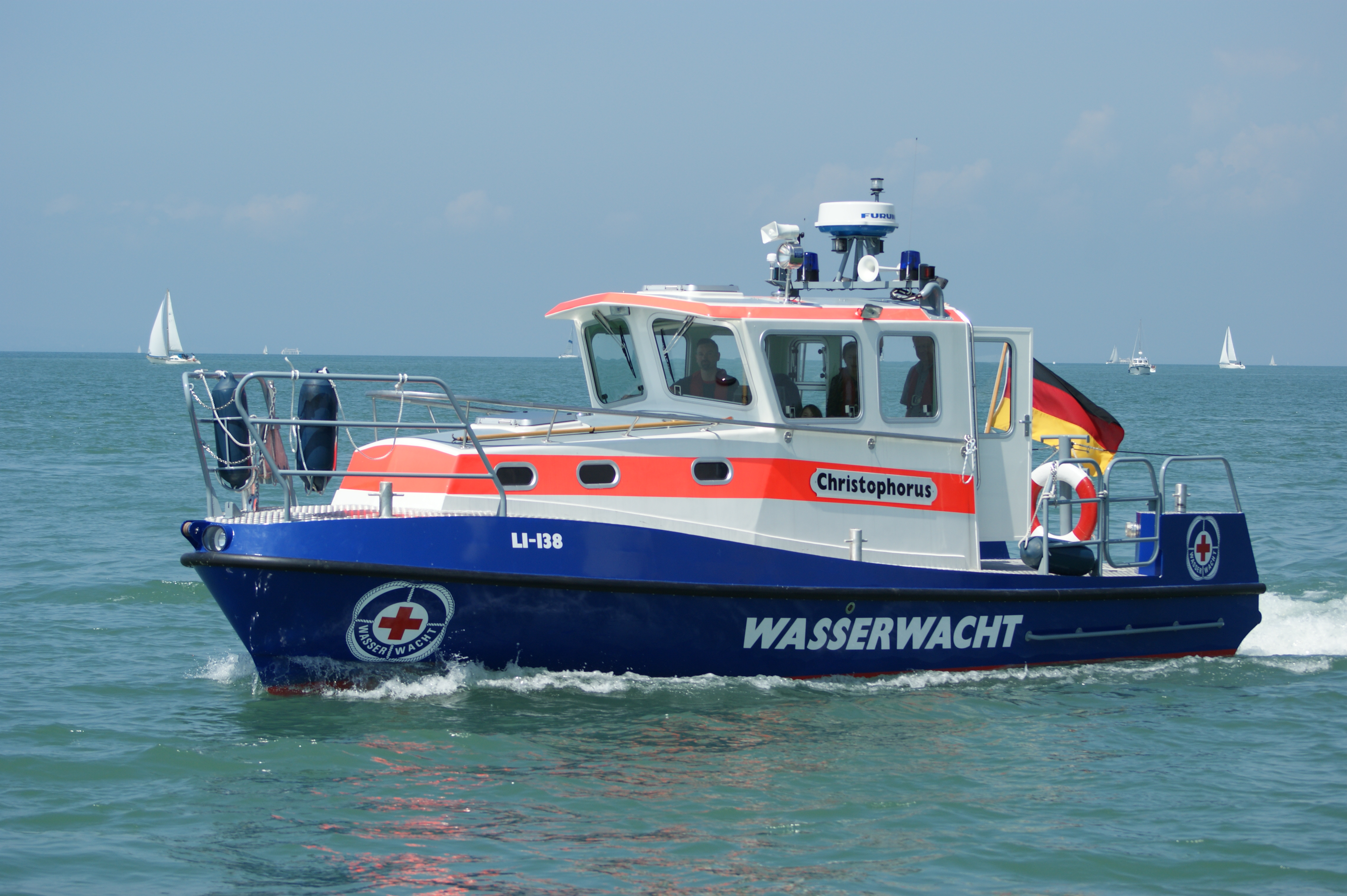 MS "Christophorus" LI-138, Seennotrettungsschiff der Wasserwacht am Bodensee